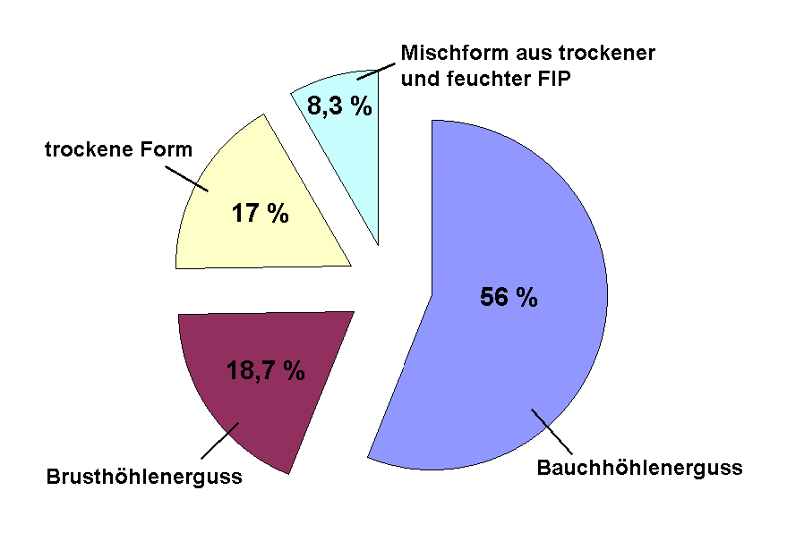 Ausprägungsformen der felinen infektiösen Peritonitis. Adaptiert nach Ettinger/Feldmann (2000) und Hartmann (2004)